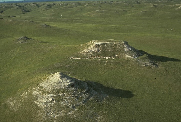 Agathe Fossil Bed National Monument, Vue aérienne.